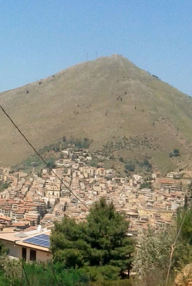 Una panoramica vista dalle montagnole